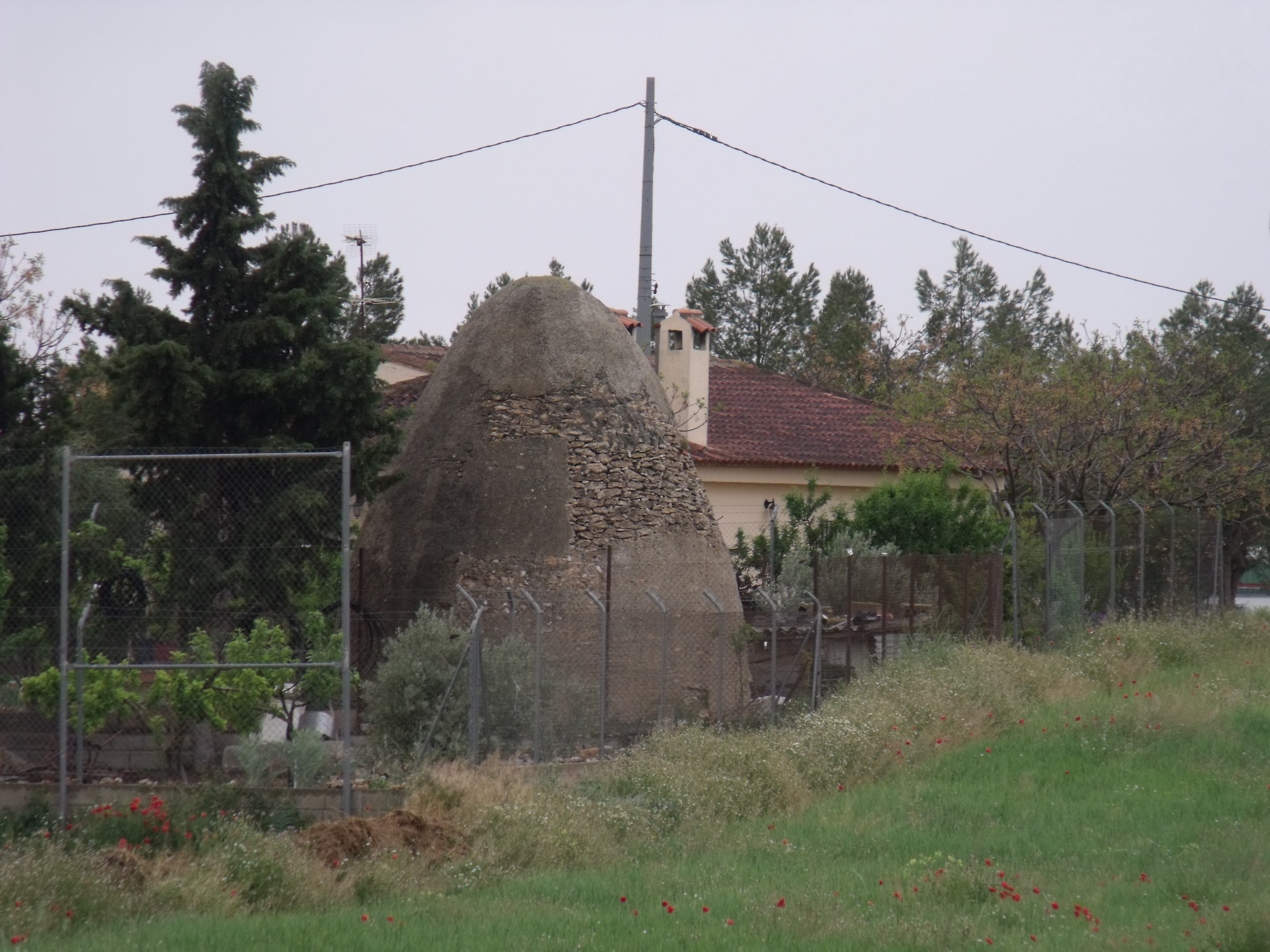 Cuco en una propiedad privada